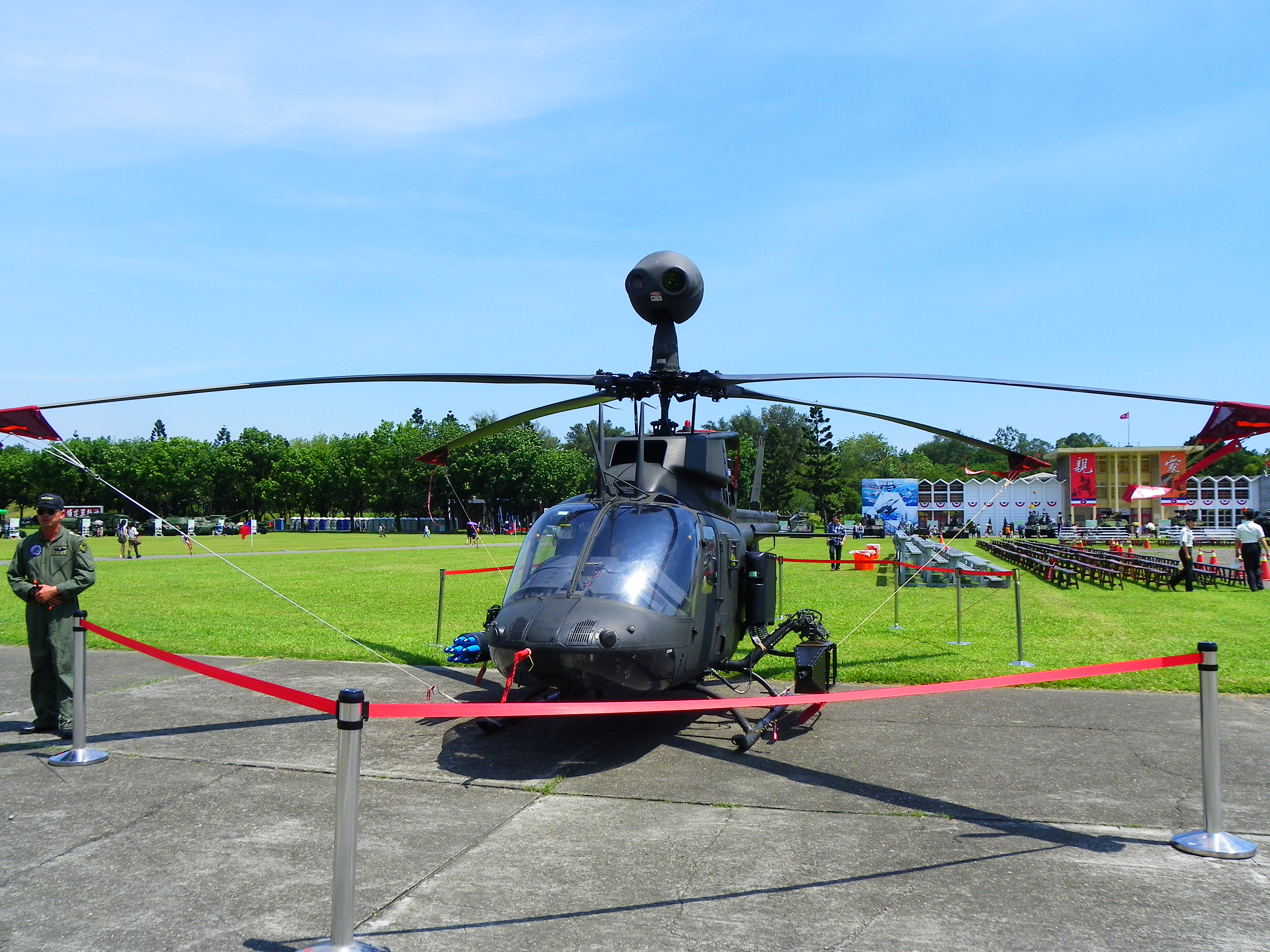 2014年陸軍官校營區開放活動，操場展示的陸航OH-58D 636正面。